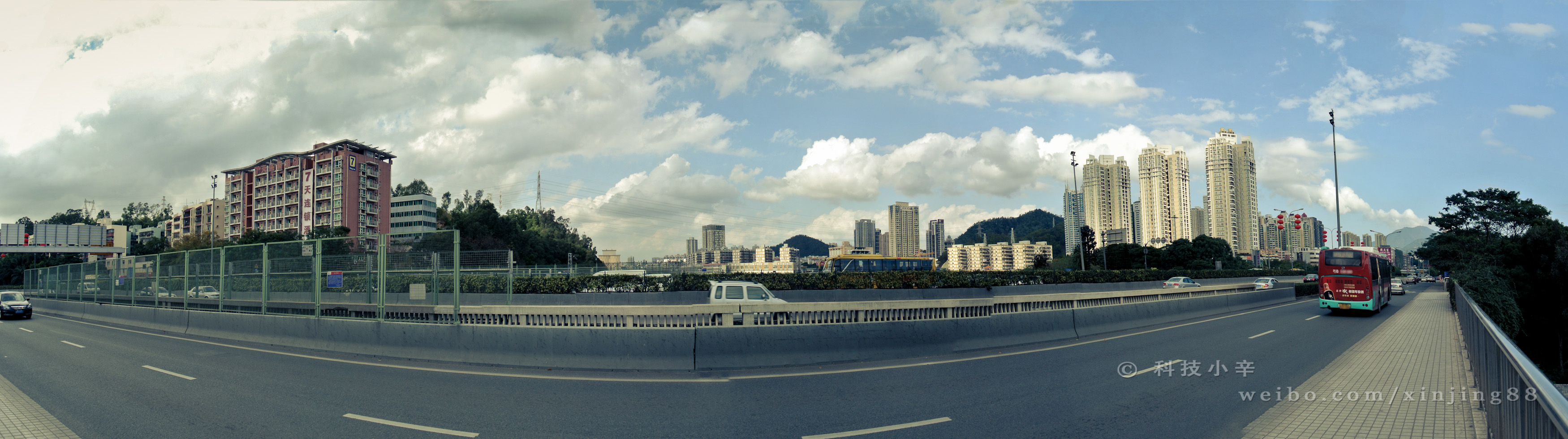 笋岗东路全景图 (2013-02-06)